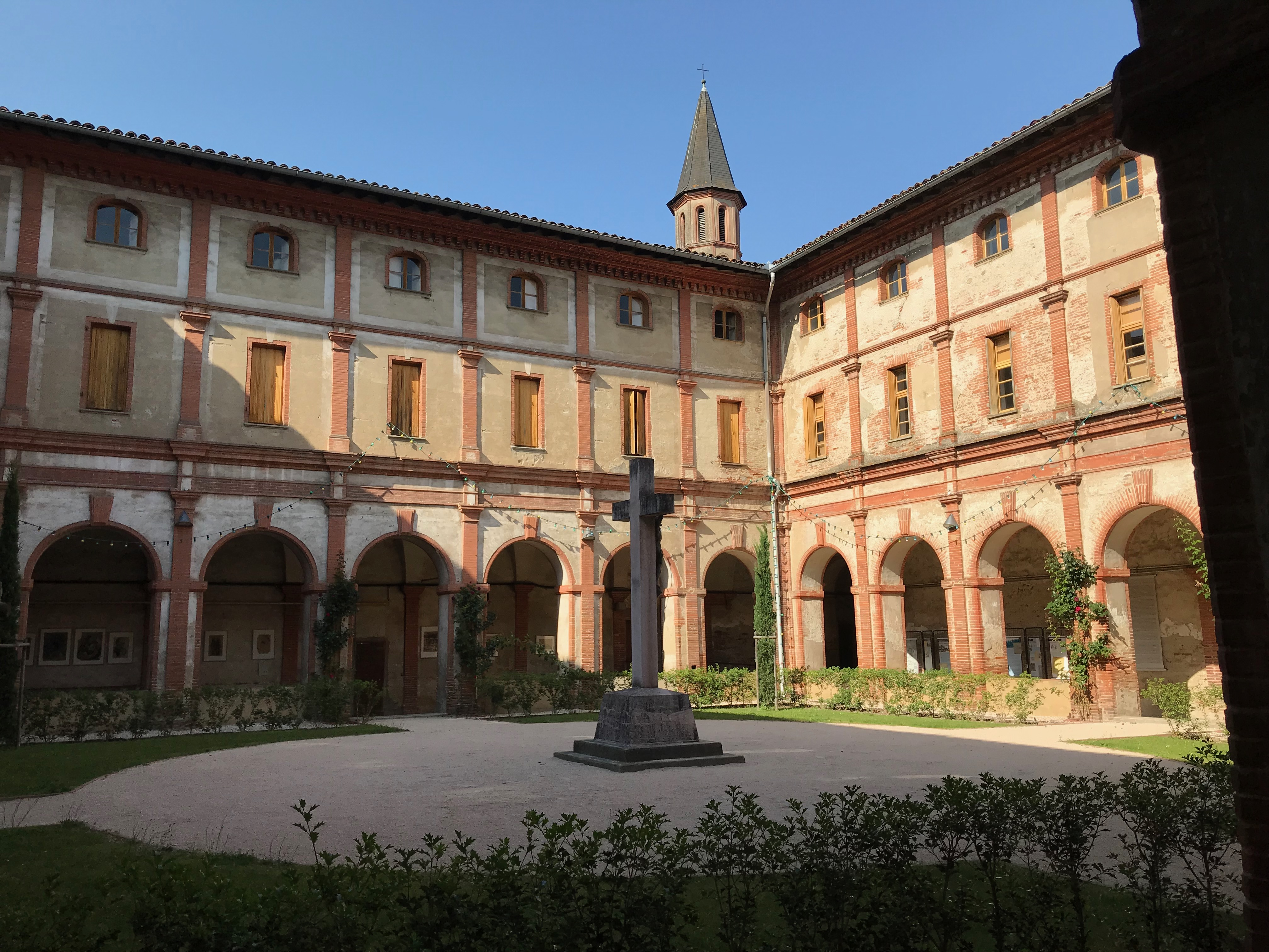 Le canal de Pamiers le long du boulevard Delcassé